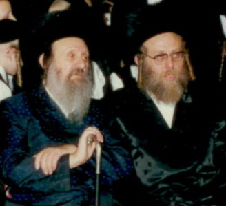 רבי שלום מקאמרנא בעל המעשה שלום עם בנו רבי נתנאל מקאמרנא